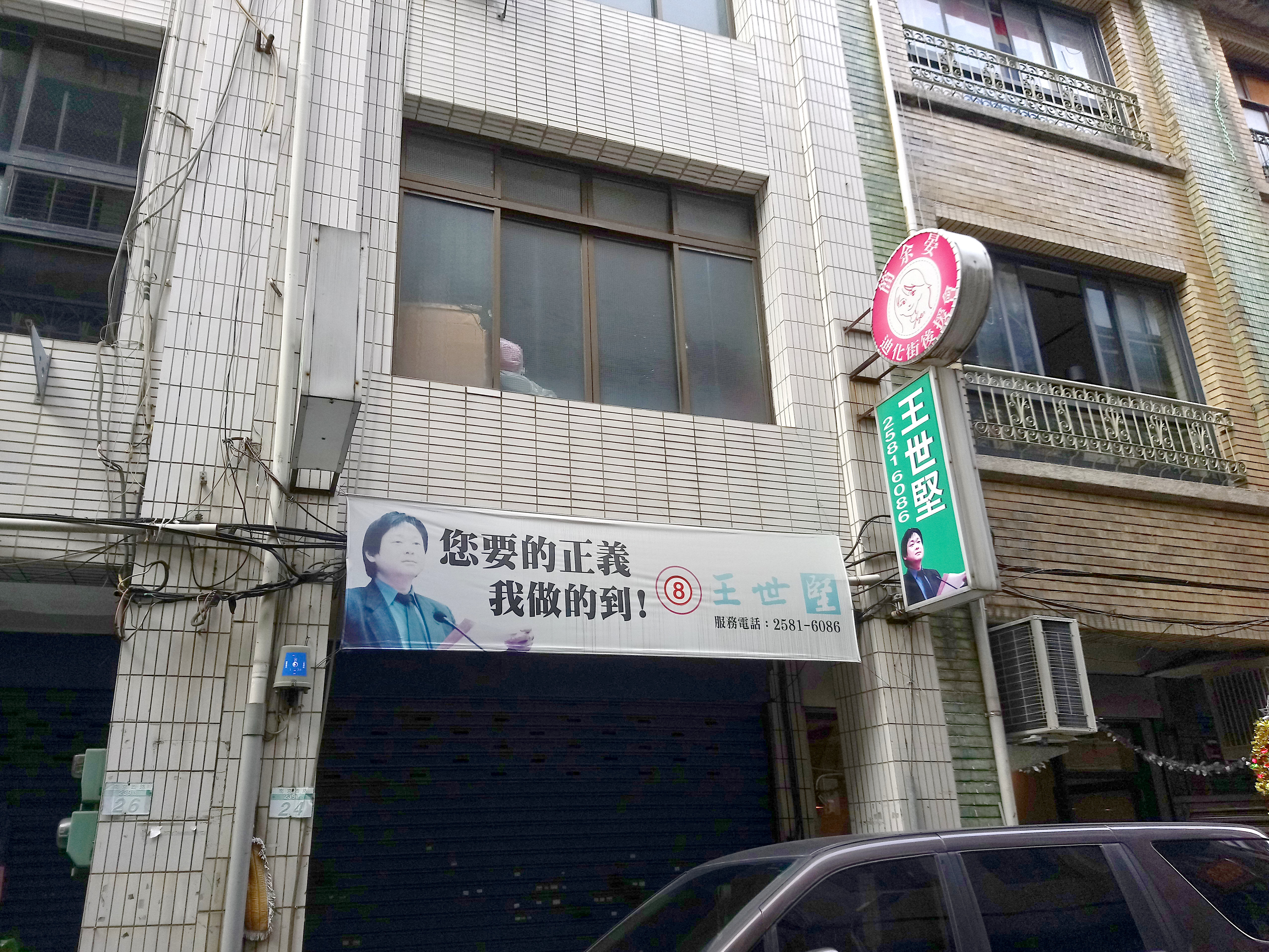 台北市大同區南京西路239巷24號王世堅服務處暨簡余晏迪化街後援會,台北市大同區延平次分區永樂里